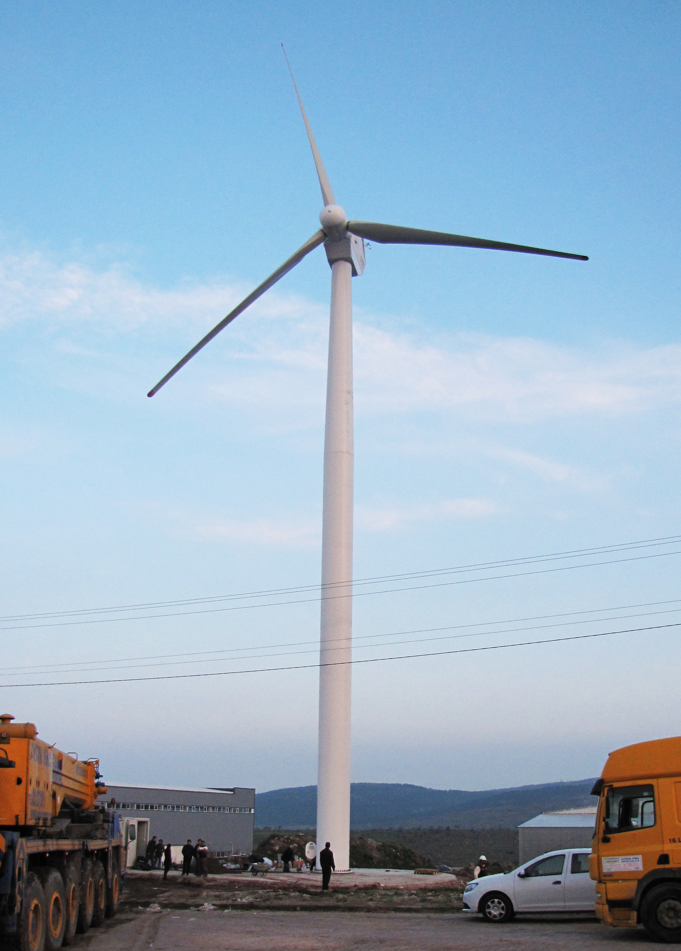 Vira-250kW Northel Enerji'nin, Vira serisi 250 kW gücünde Bandırma OSB 'ye kurulmuş şebeke bağlantılı bir rüzgar türbini.